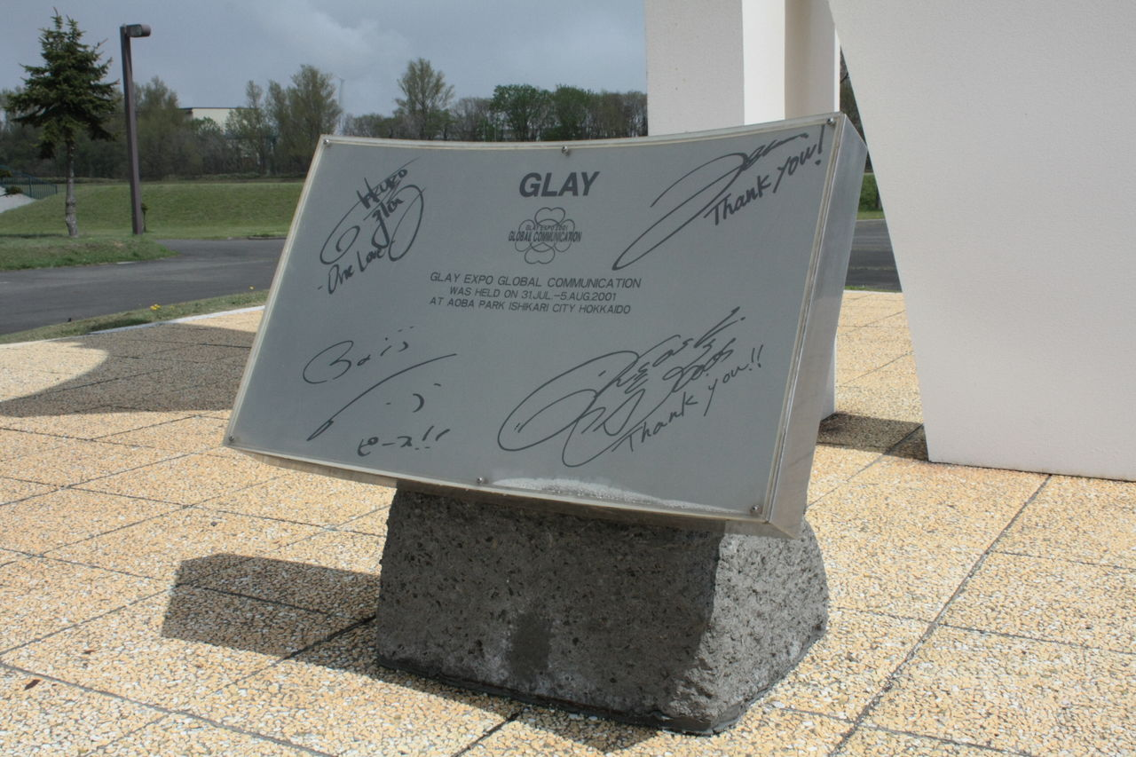 催事後に設営された記念碑